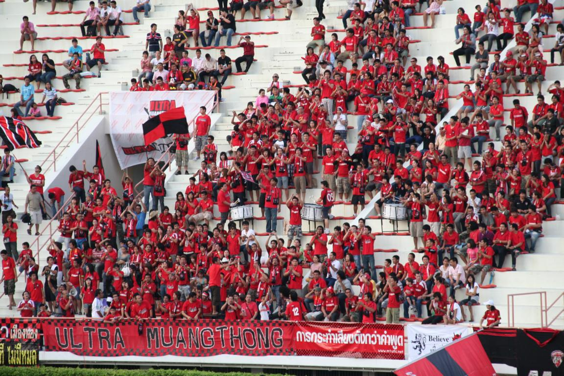 Muang Thong Ultras